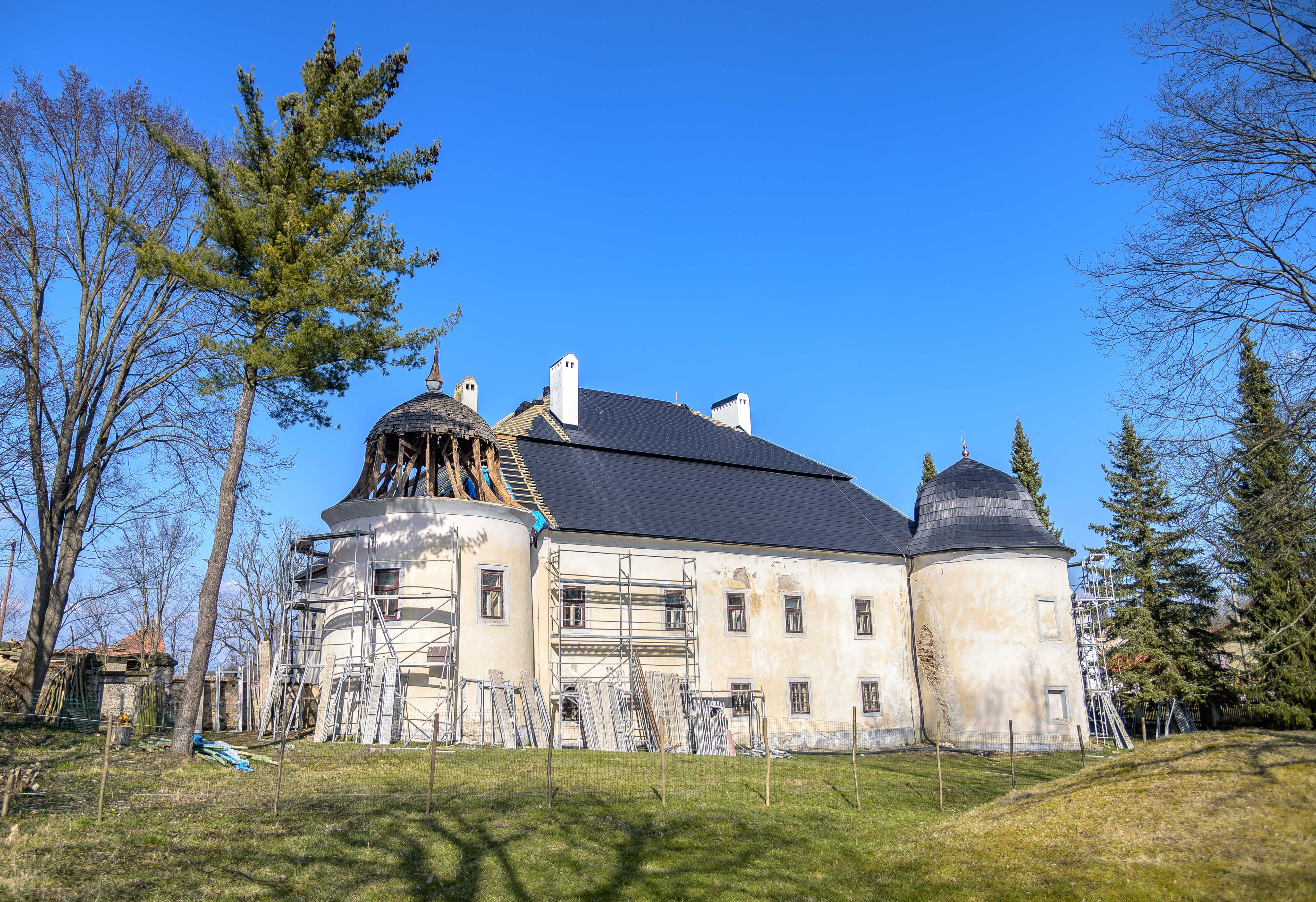 Rekonštrukcia kaštieľa v Ostrej Lúke (2020)